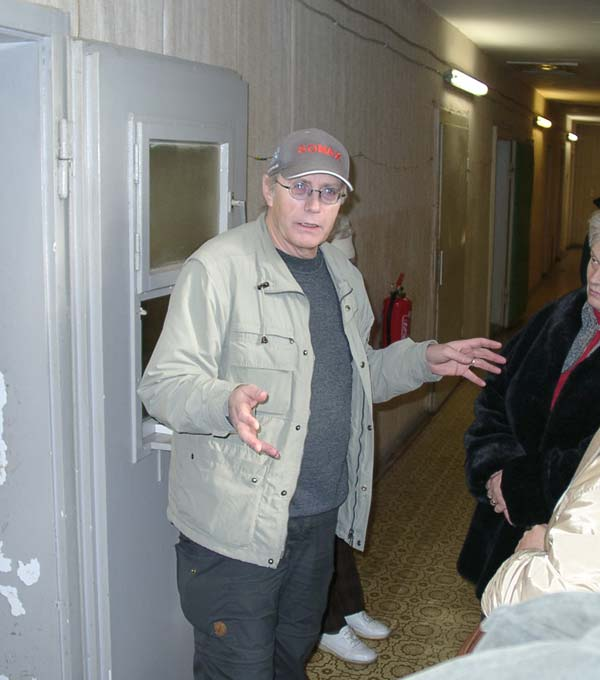 Rainer Dellmuth bei einer Führung im ehemaligen Stasigefängnis Hohenschönhausen